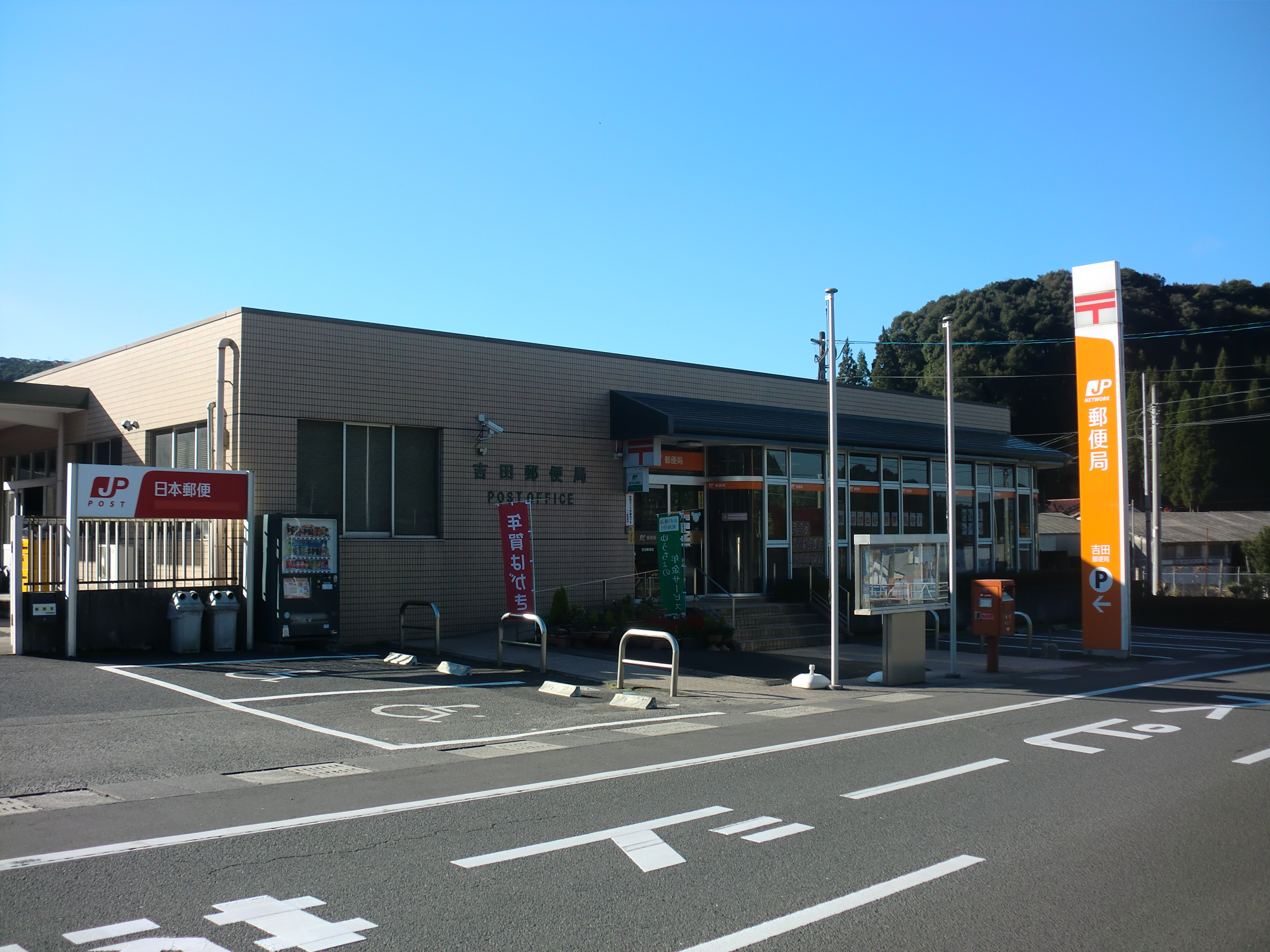 鹿児島市にある吉田郵便局